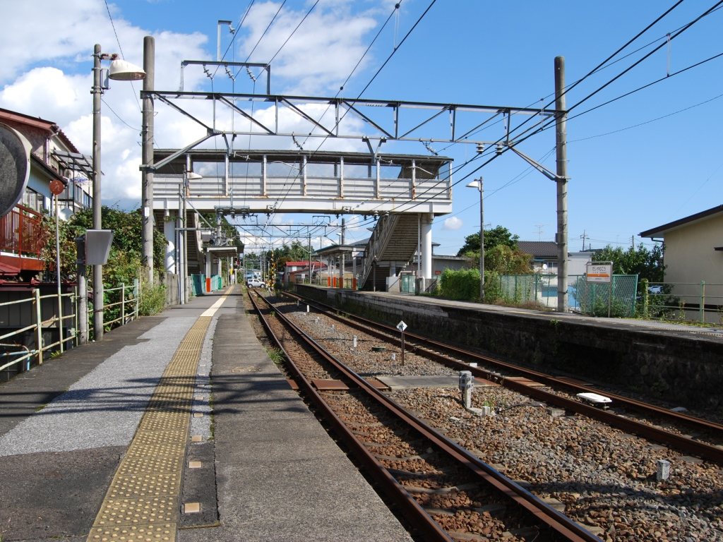 東武鉄道鬼怒川線大谷向駅ホーム全景（2008/10/28撮影）